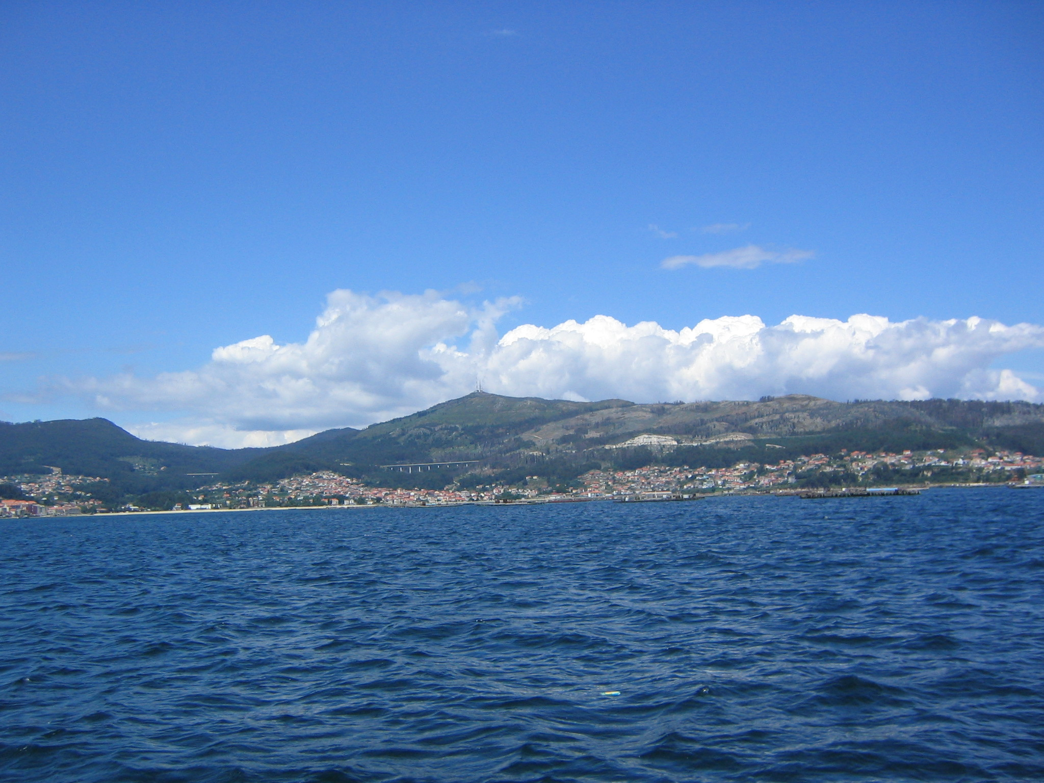 Vista de Moaña y el monte Faro, Pontevedra, Galicia (España).